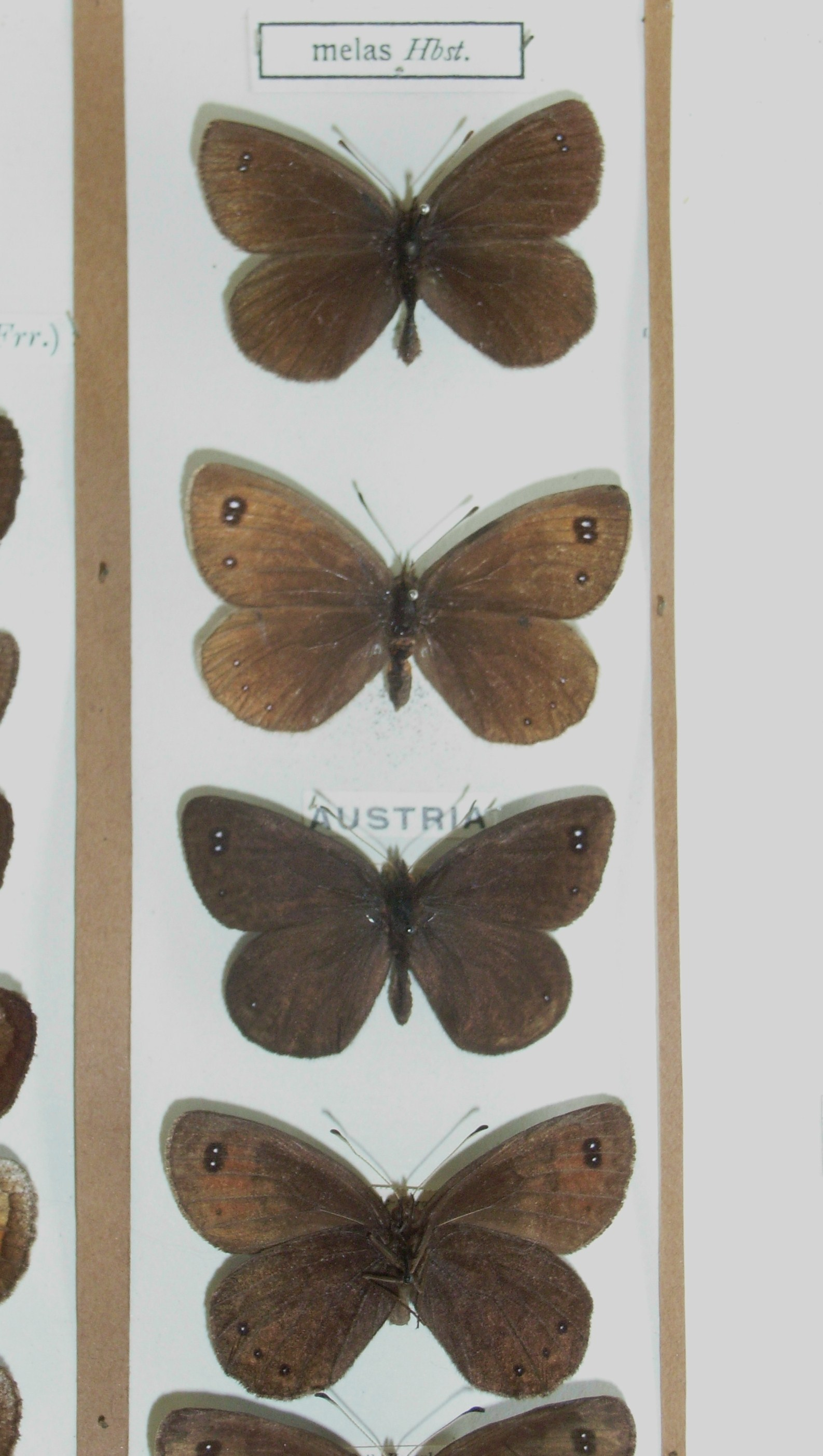 Erebia melas